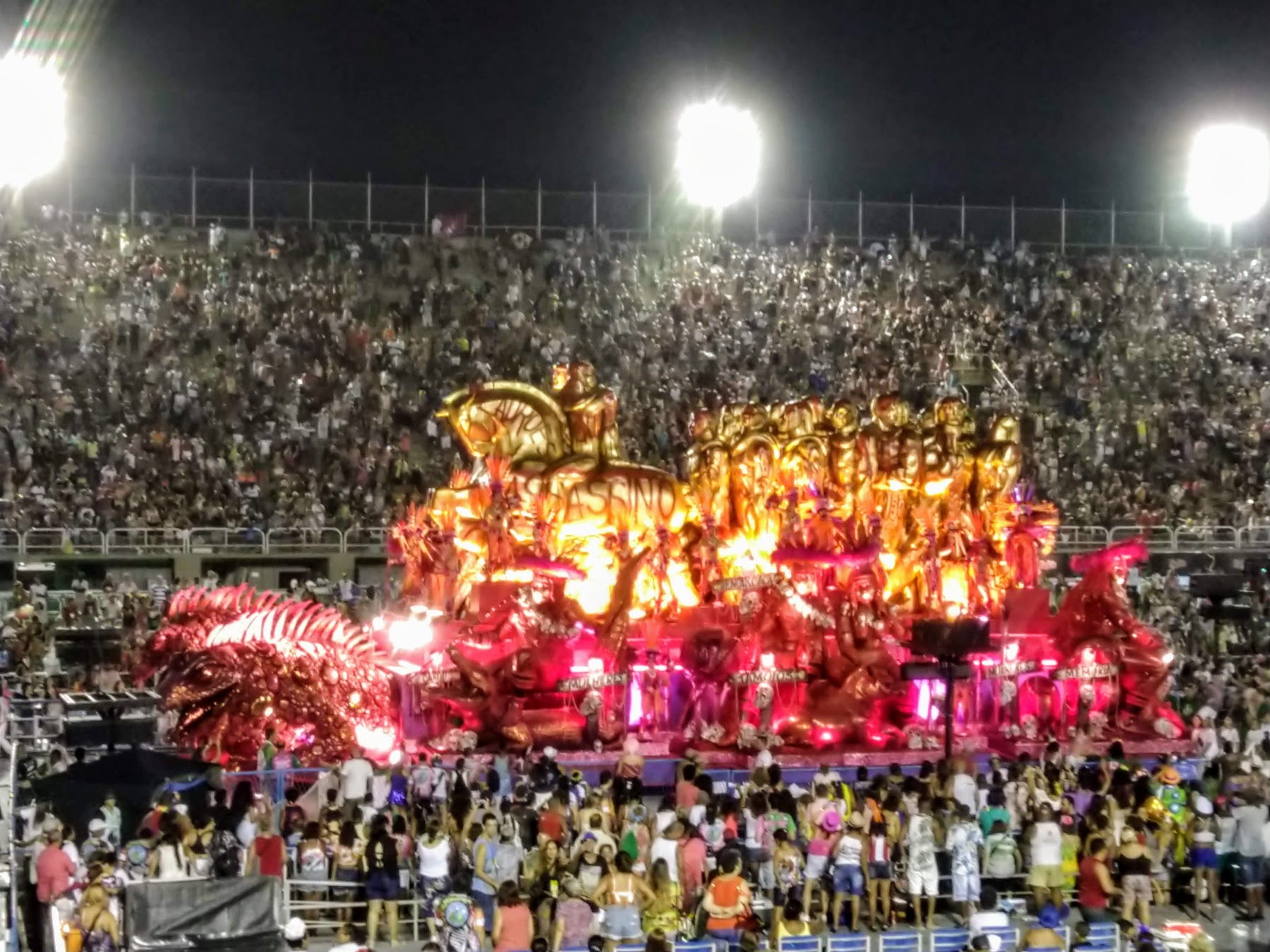 GRES Estação Primeira de Mangueira no Desfile das Campeãs de 2019